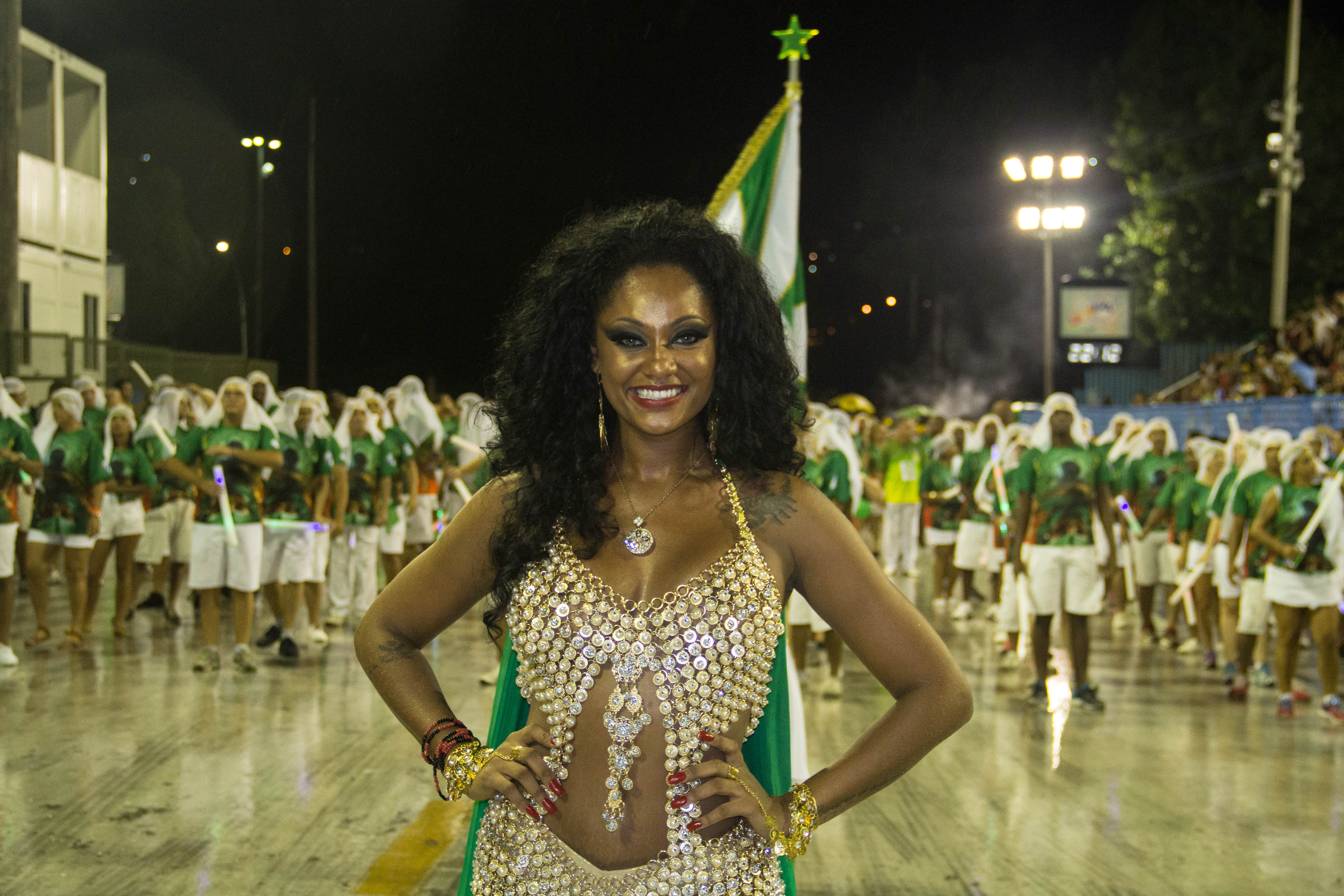 Ensaio técnico da Escola de Samba Mocidade Independente de Padre Miguel (grupo especial) no Sambódromo da Marques de Sapucaí, no centro do Rio, neste domingo (22/01). Na preparação para o Carnaval de 2017, a escola vai desfilar com o enredo “As Mil e Uma Noites de uma ‘Mocidade’ prá lá de Marrakesh” Foto: Marcelo Teixeira/Raw Image